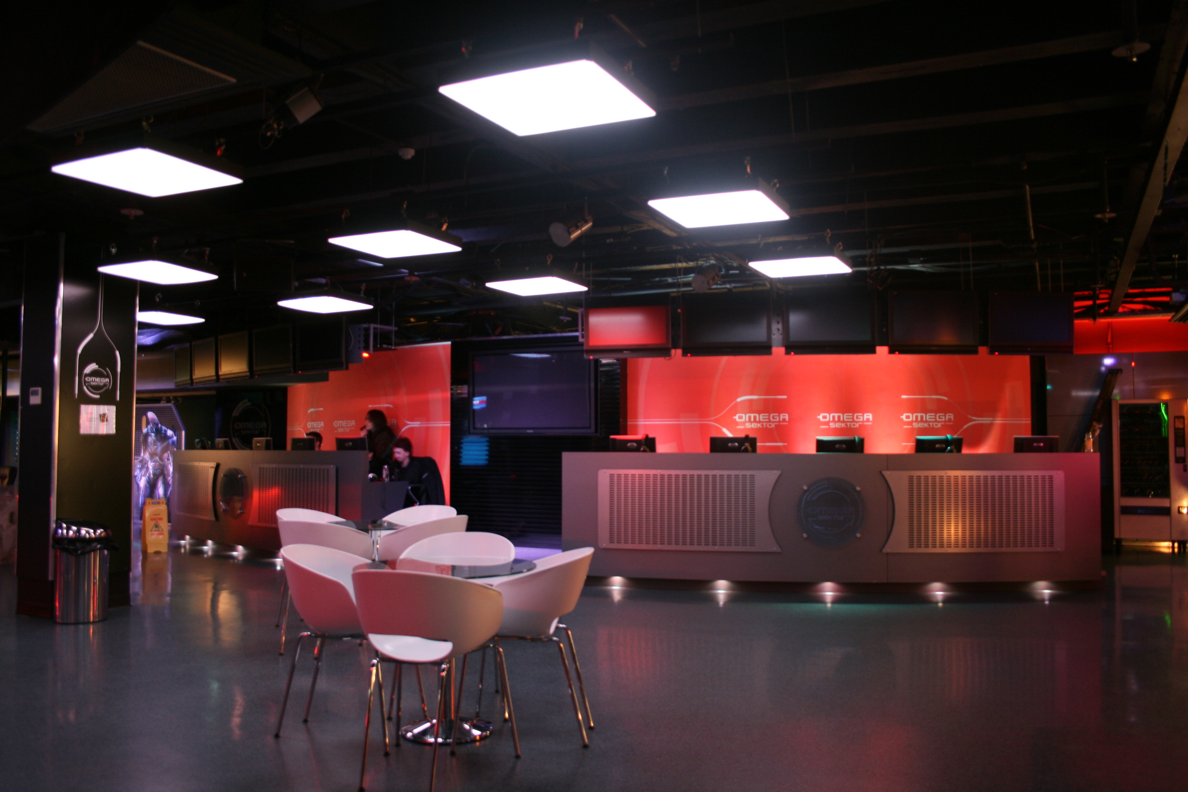 Omega Sektor Stage